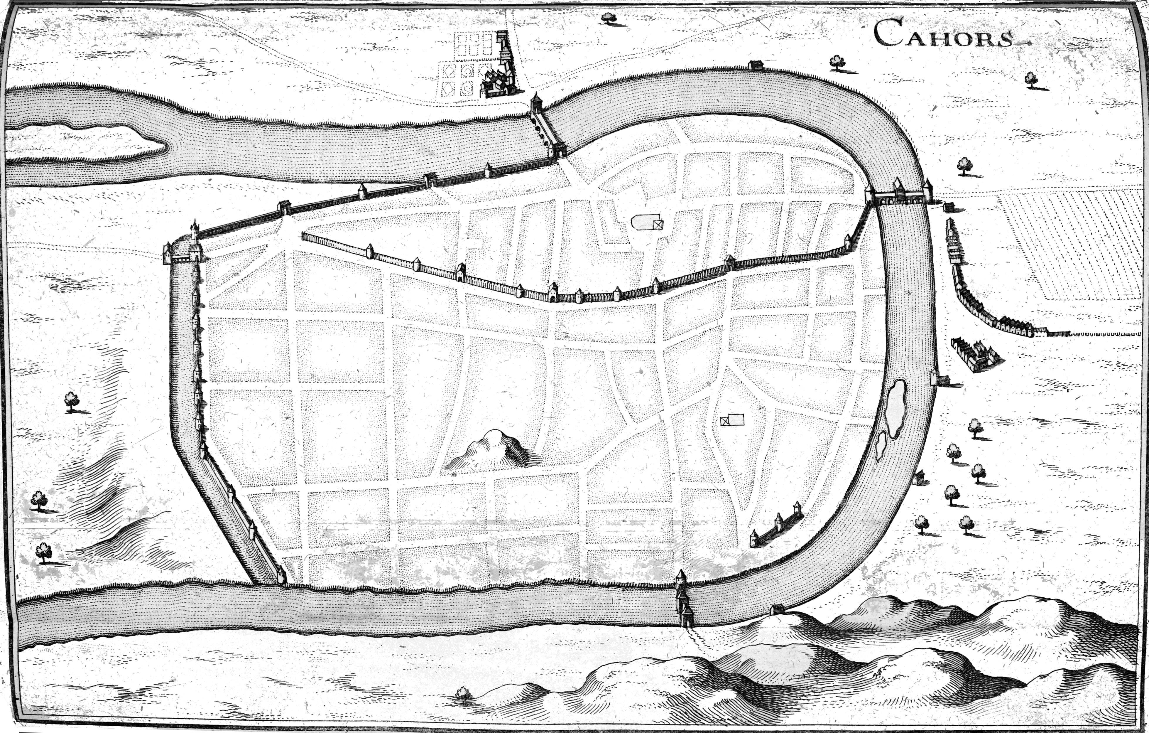 présenté dans "Topographiae Galliae".